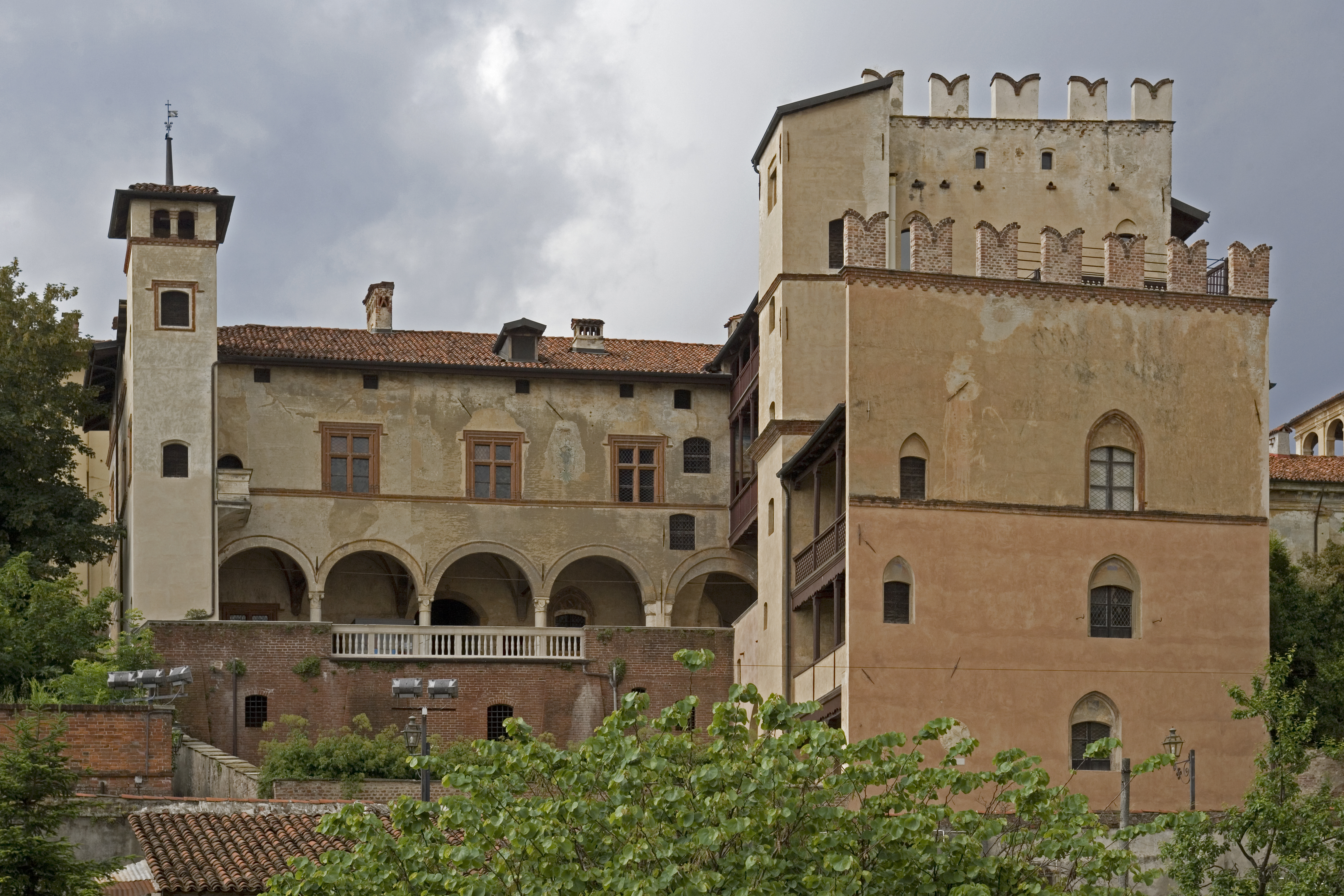 Saluzzo, Casa Cavazza, attualmente sede del Museo Civico della città di Saluzzo. Anticamente fu la dimora dei marchesi di Saluzzo e in seguito della famiglia Cavassa, originaria di Carmagnola i cui membri furono ed entrambi Vicari Generali del Marchese di Saluzzo.